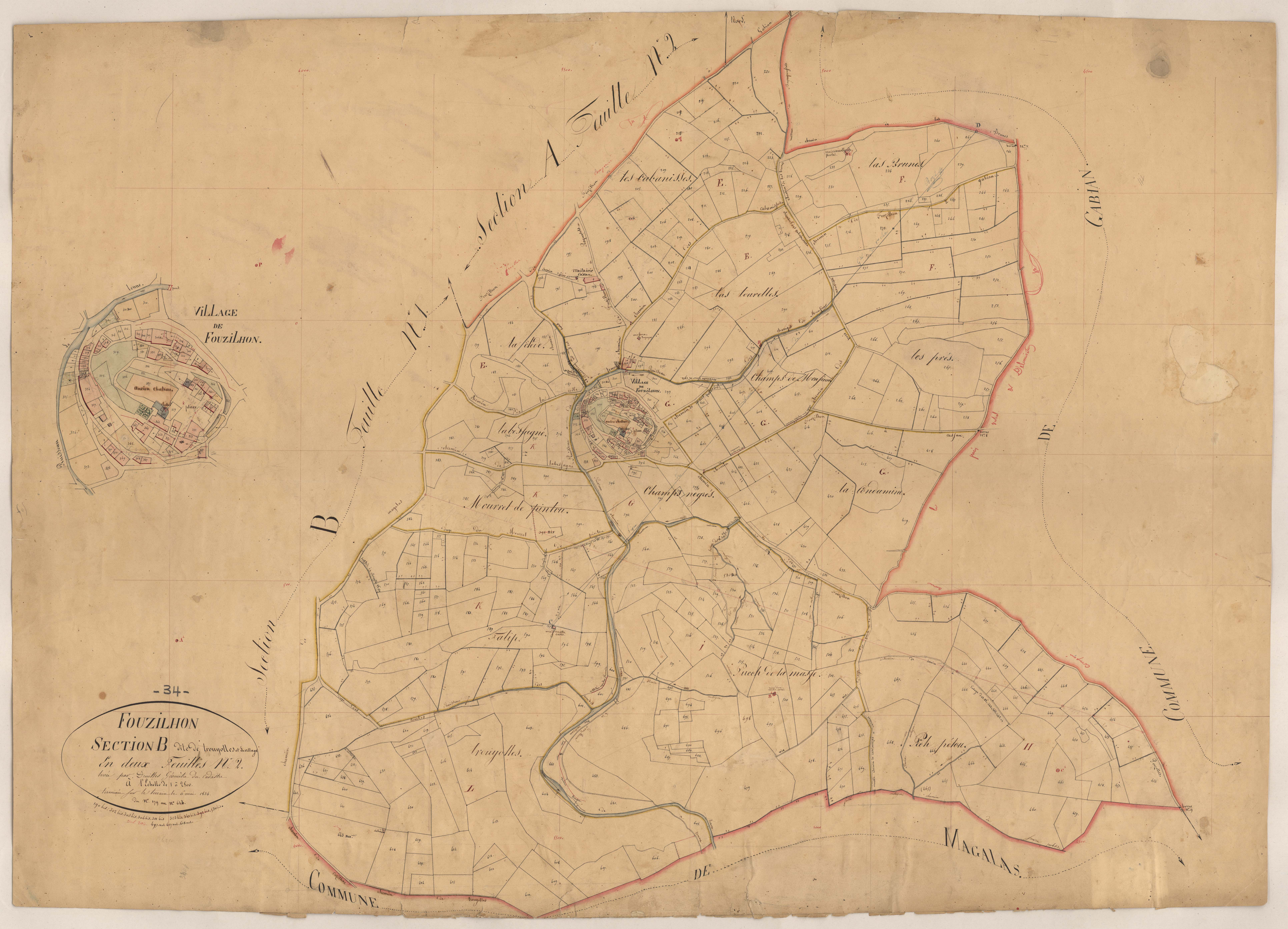 Fouzilhon. - Cadastre napoléonien : plan de la section B2 de Trouyolles et du Village